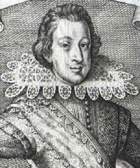 Porträt des Prinzen Otto von Hessen-Kassel (* 24. Dezember 1594 in Kassel; † 7. August 1617 in Hersfeld), Erbprinz von Hessen-Kassel, Administrator des Fürstentums Hersfeld und Statthalter seines Vaters in Oberhessen. Verheiratet in erster Ehe mit Katharina Ursula (1598-1615), Tochter des Markgrafen Georg Friedrich von Baden-Durlach, in zweiter Ehe mit Agnes Magdalena (1590-1626), Tochter des Fürsten Johann Georg I. von Anhalt-Dessau. Detail aus einem zeitgenössischen Stich des 17. Jahrhunderts mit seinen beiden Ehefrauen. Inhaltsverzeichnis